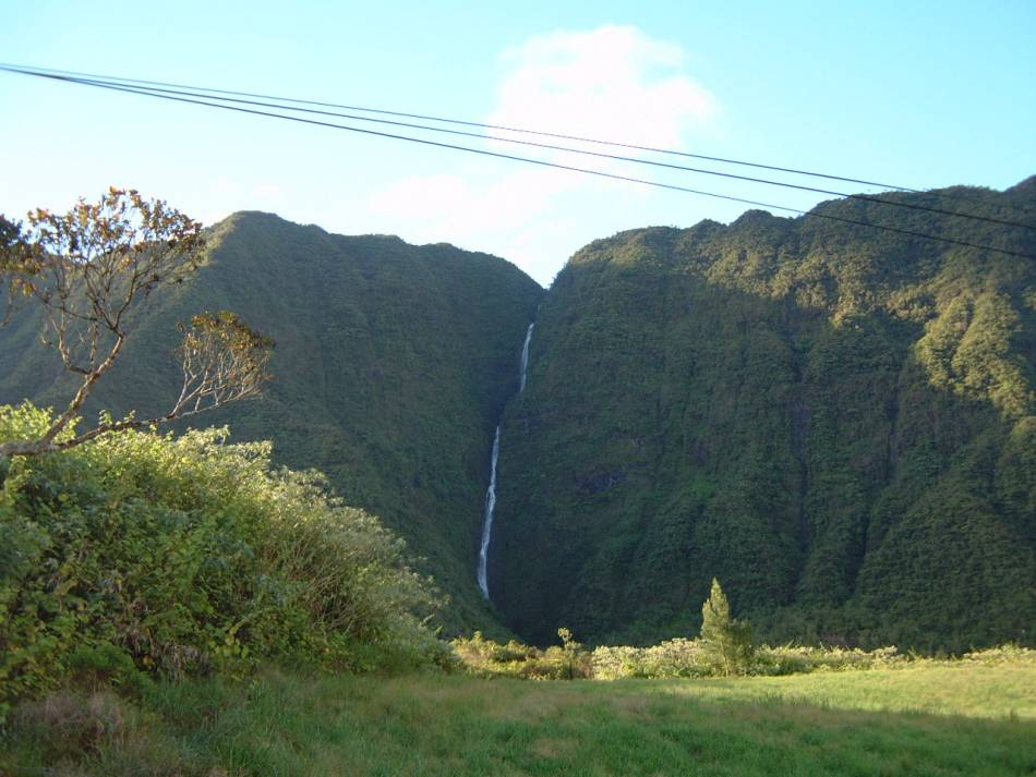 Photo prise par Nerijp en novembre-décembre 2005. Elle est libre de droit d'après cette page.